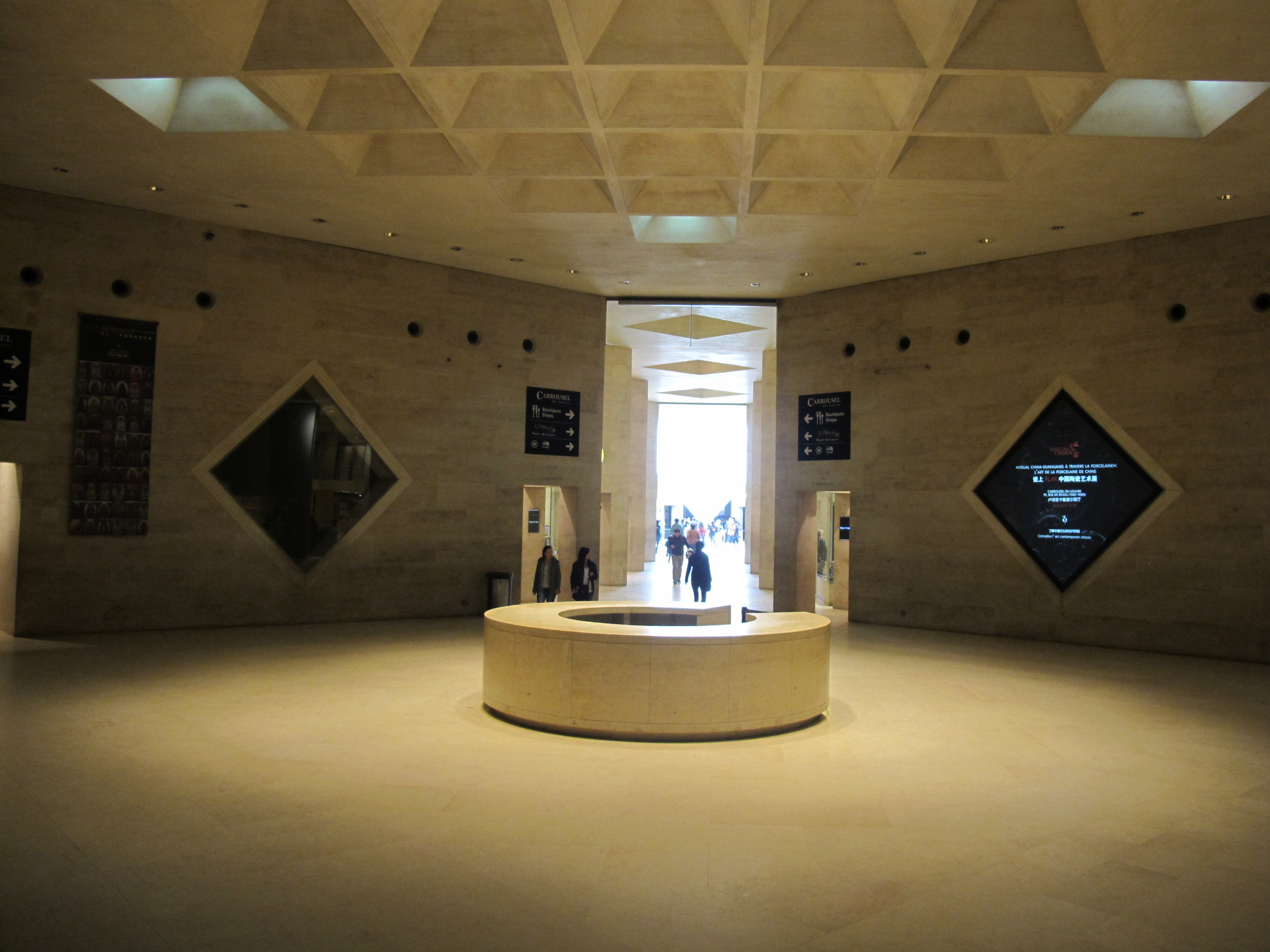 Carrousel du Louvre